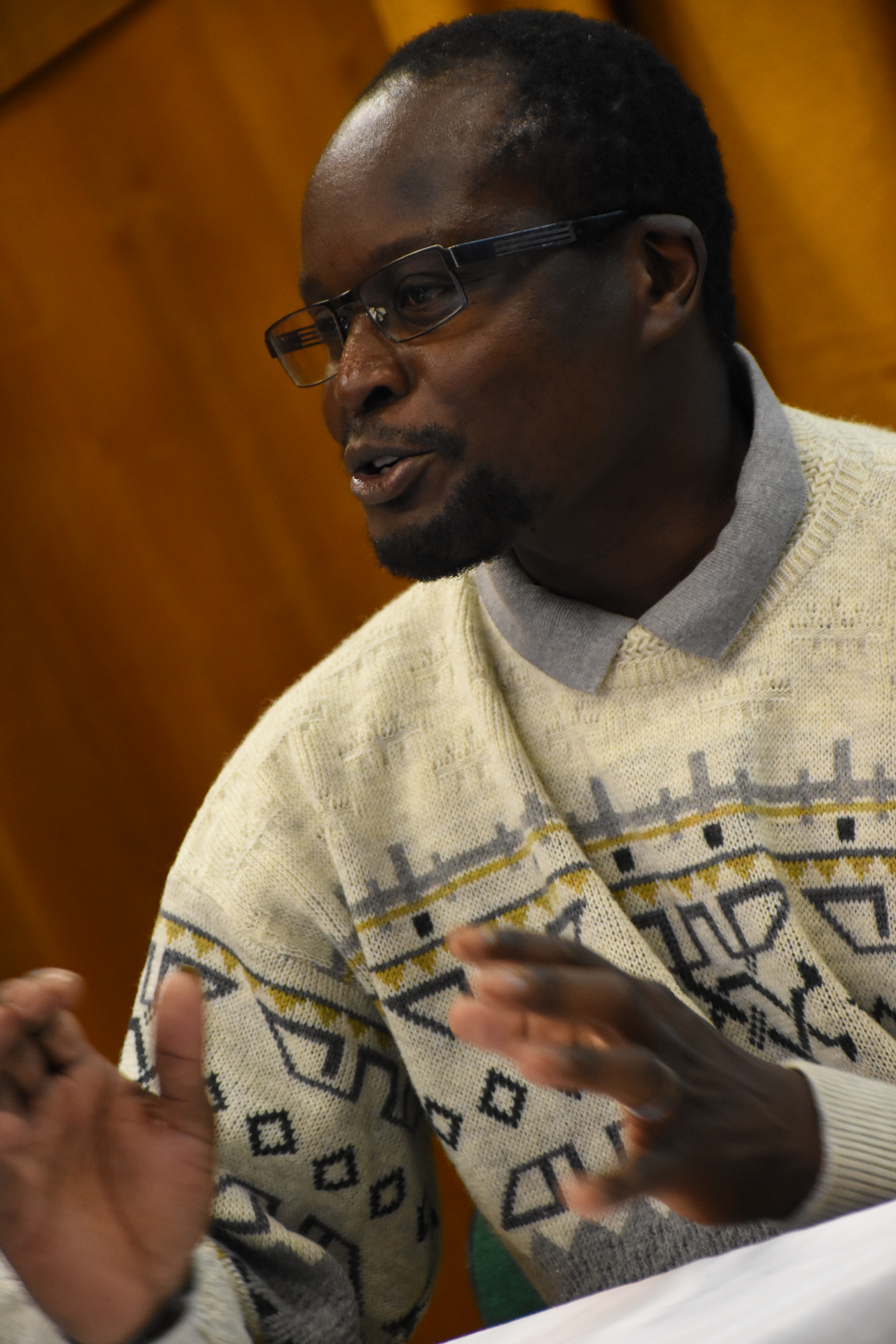 Bob Helekia Ogola na Sjezdu (nejen) evangelické mládeže v Třebíči